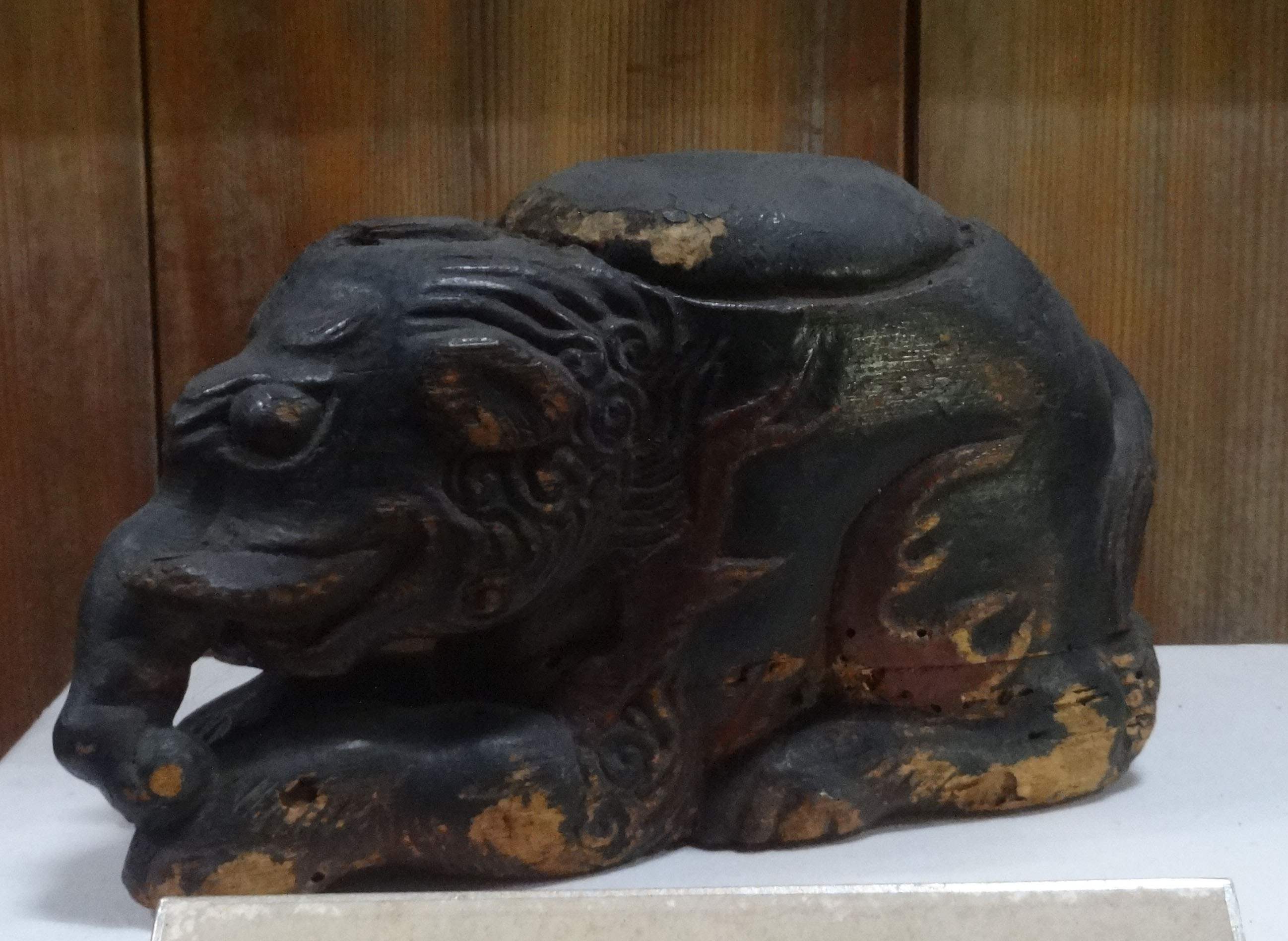 獏枕（伝豊公所用）